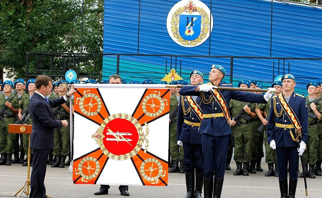 Церемония вручения Боевого знамени 11-й десантно-штурмовой бригаде Восточного военного округа.